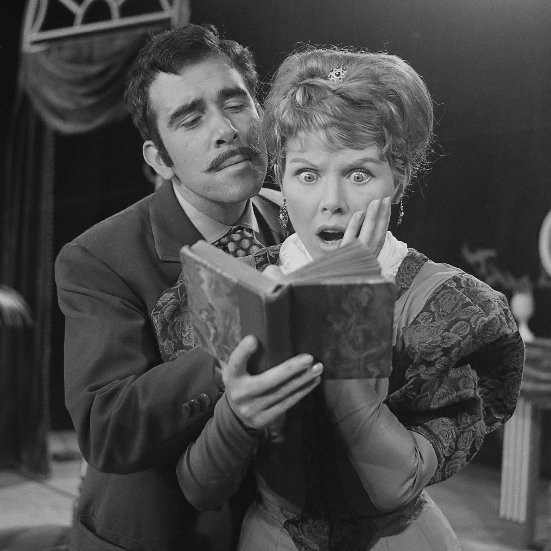 Repetitie televisiespel "Literatuur". Wim van den Heuvel en Yoka Berretty 20 juli 1961